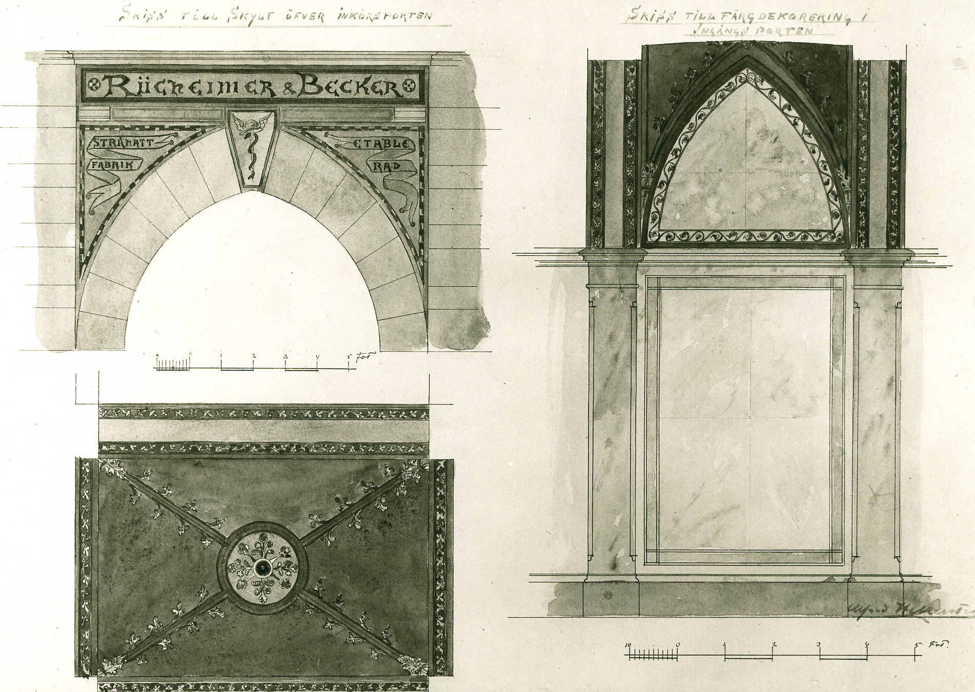 Rügheimer & Beckers stråhattfabrik, skisser utförda av arkitekt Alfred Hellerström